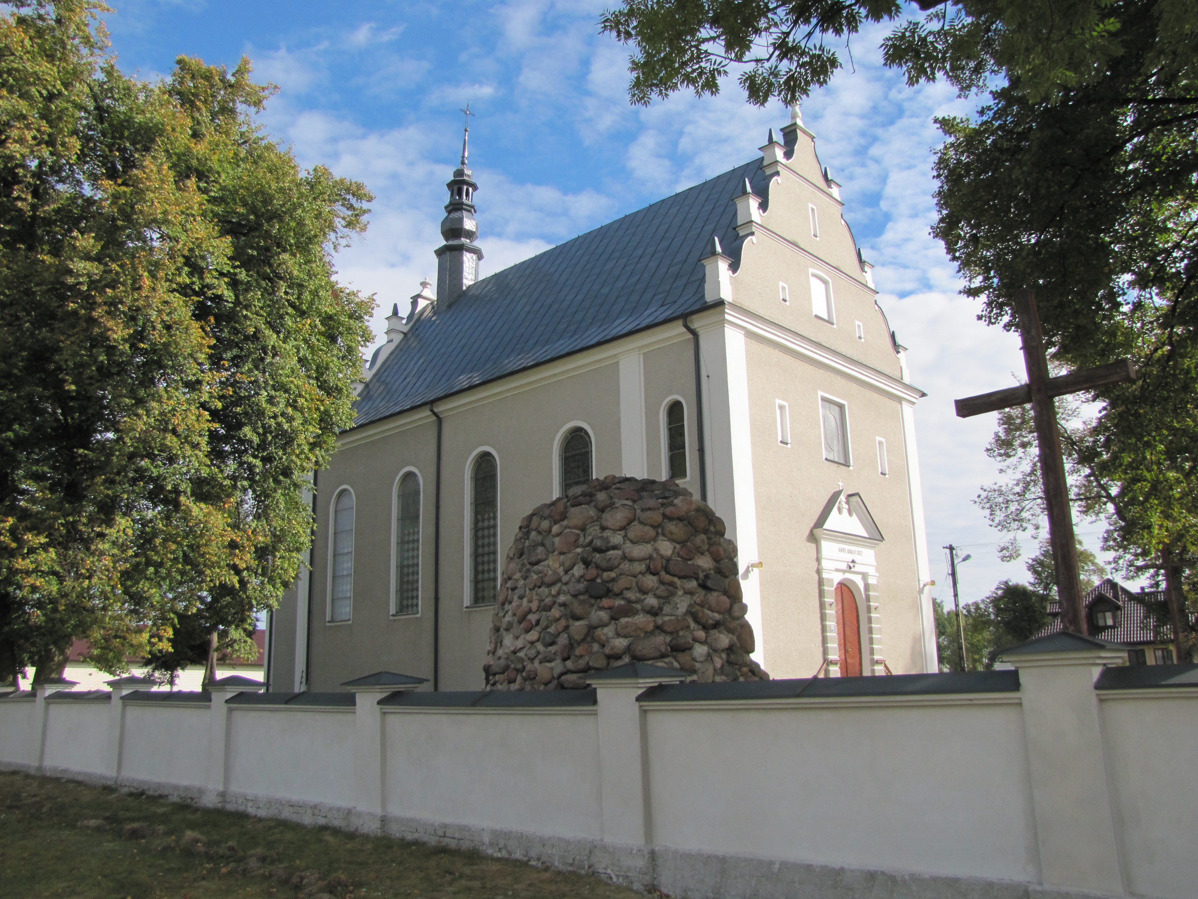 Mostów - kościół parafialny p.w. MB Anielskiej, 1937 (zabytek nr A-277)